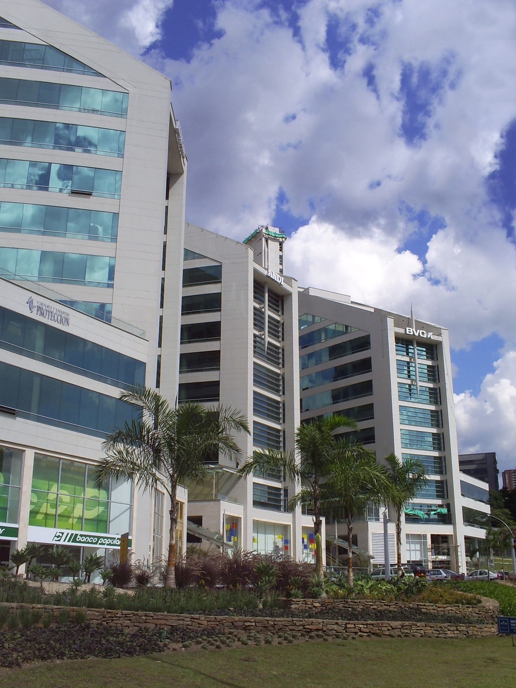 Edificios San Fernando, Avenida Poblado, Medellín, Colombia